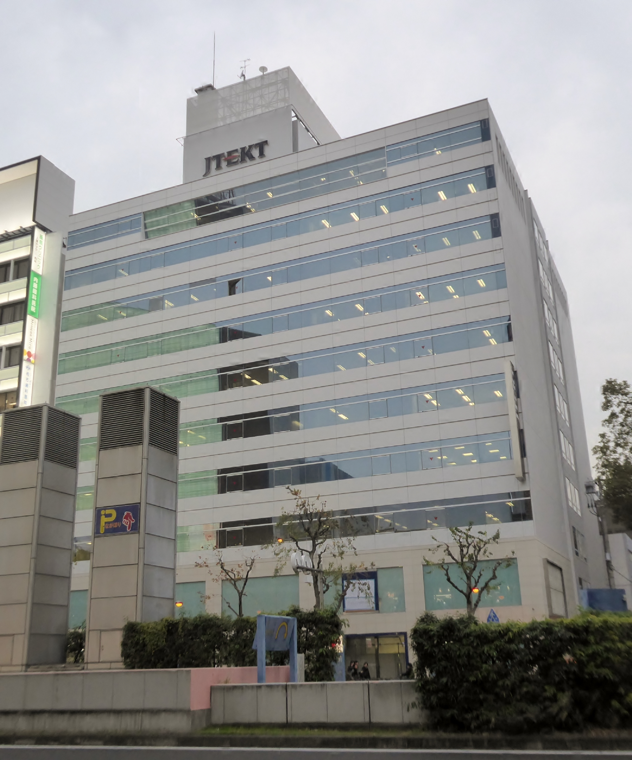 株式会社ジェイテクト大阪本社を撮影。